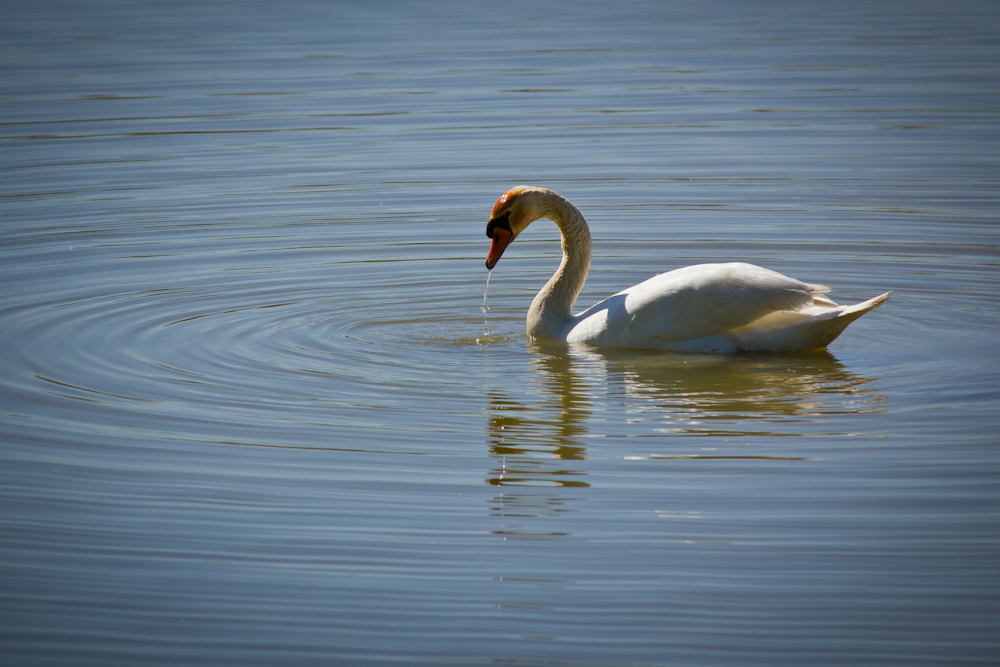 Cigno sul lago di Alviano (comune di Guardea in provincia di Terni)